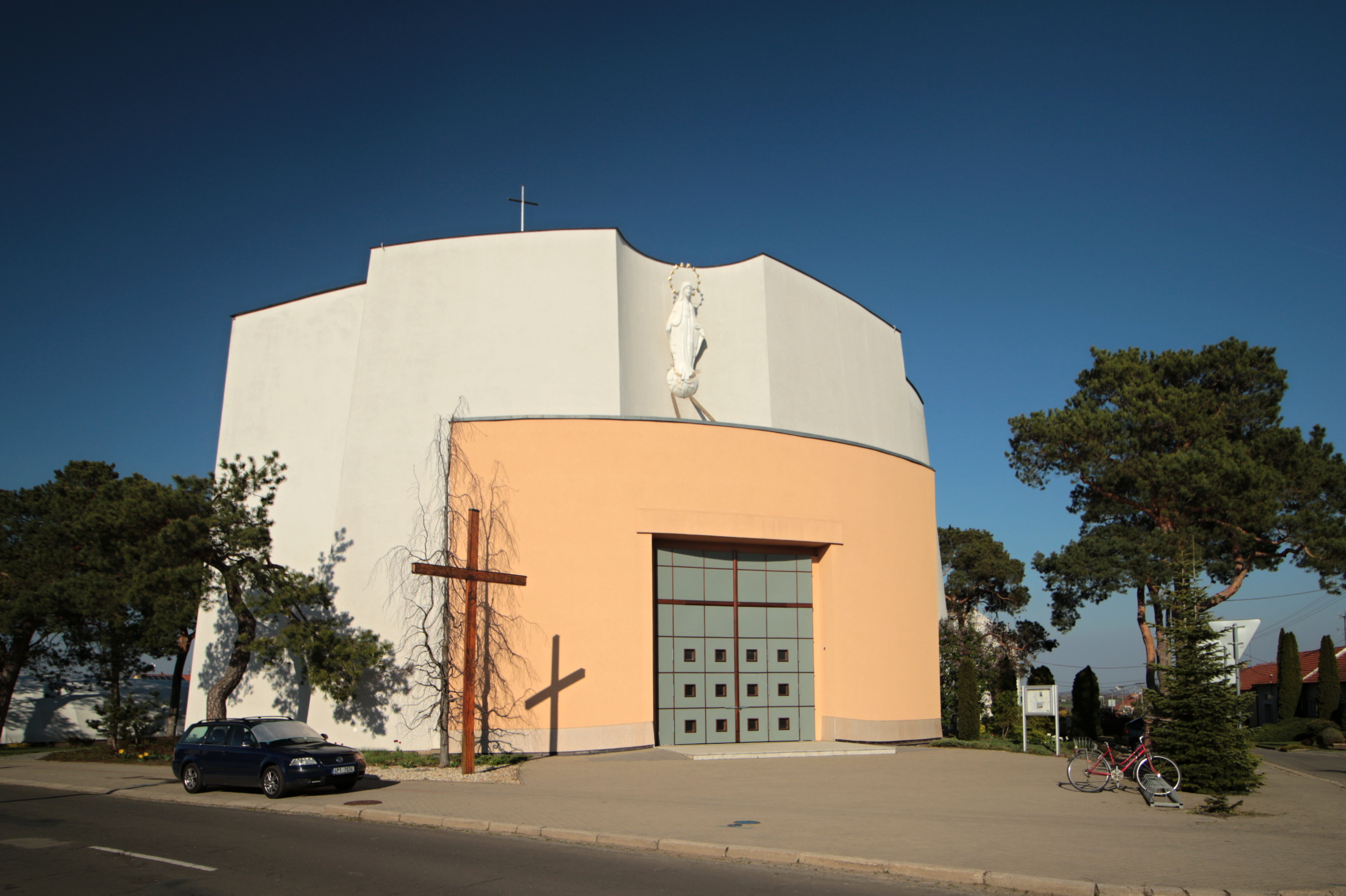 Moravský Žižkov, okres Hodonín, moderní kostel Panny Marie Vítězné